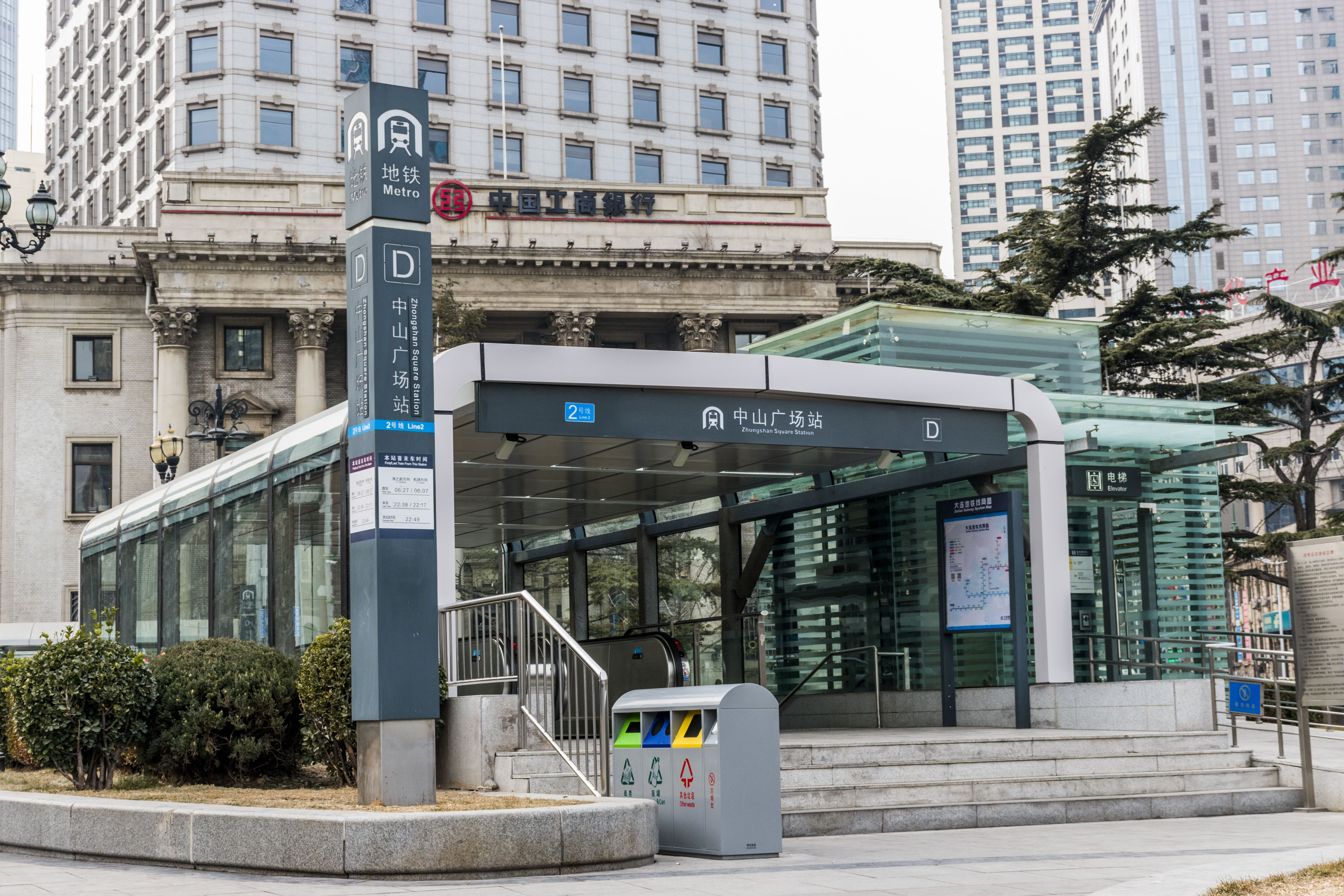 大连地铁2号线中山广场站D出口